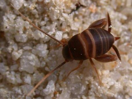 female cricket Myrmecophilus acervorum